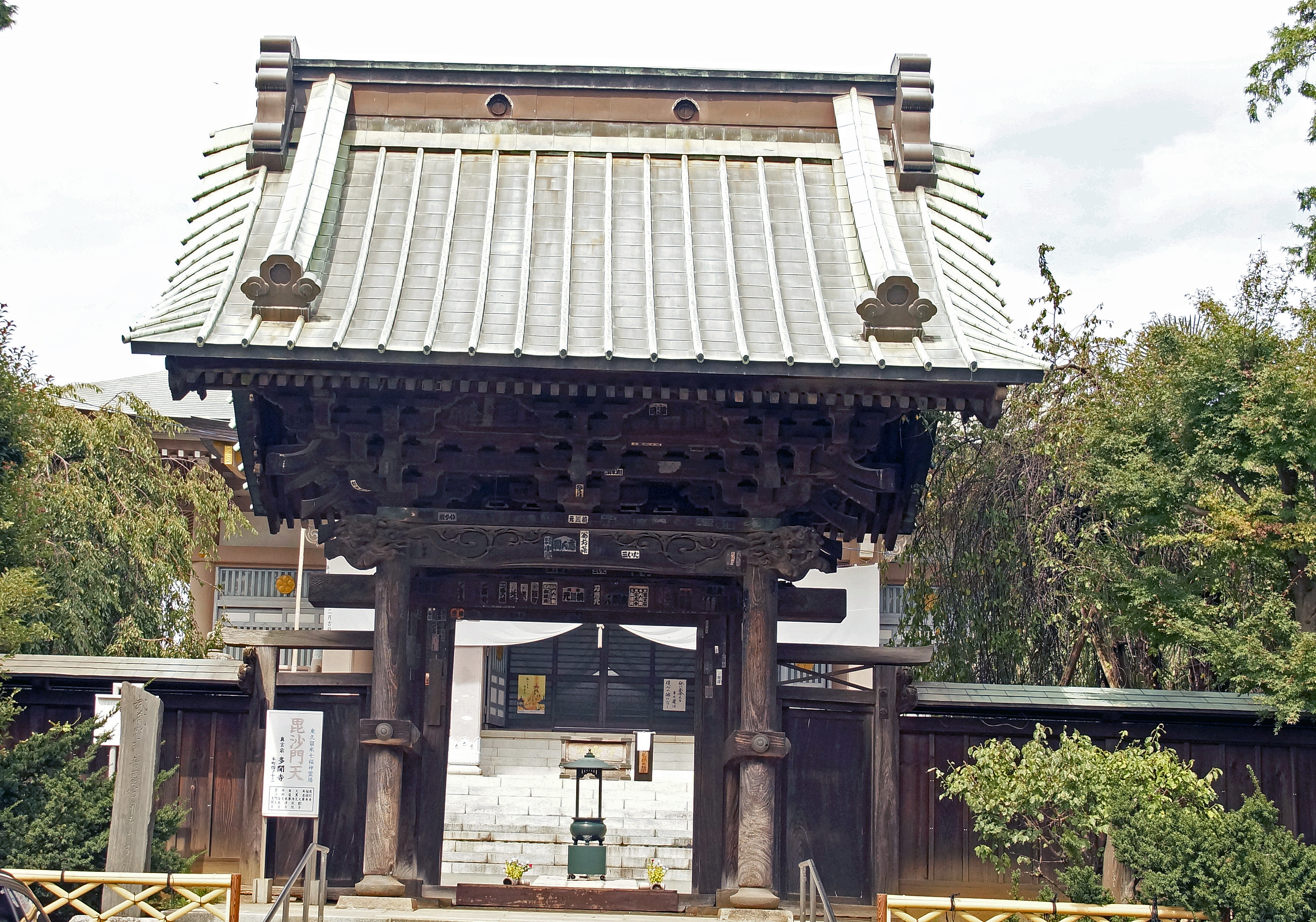 東久留米多聞寺の山門